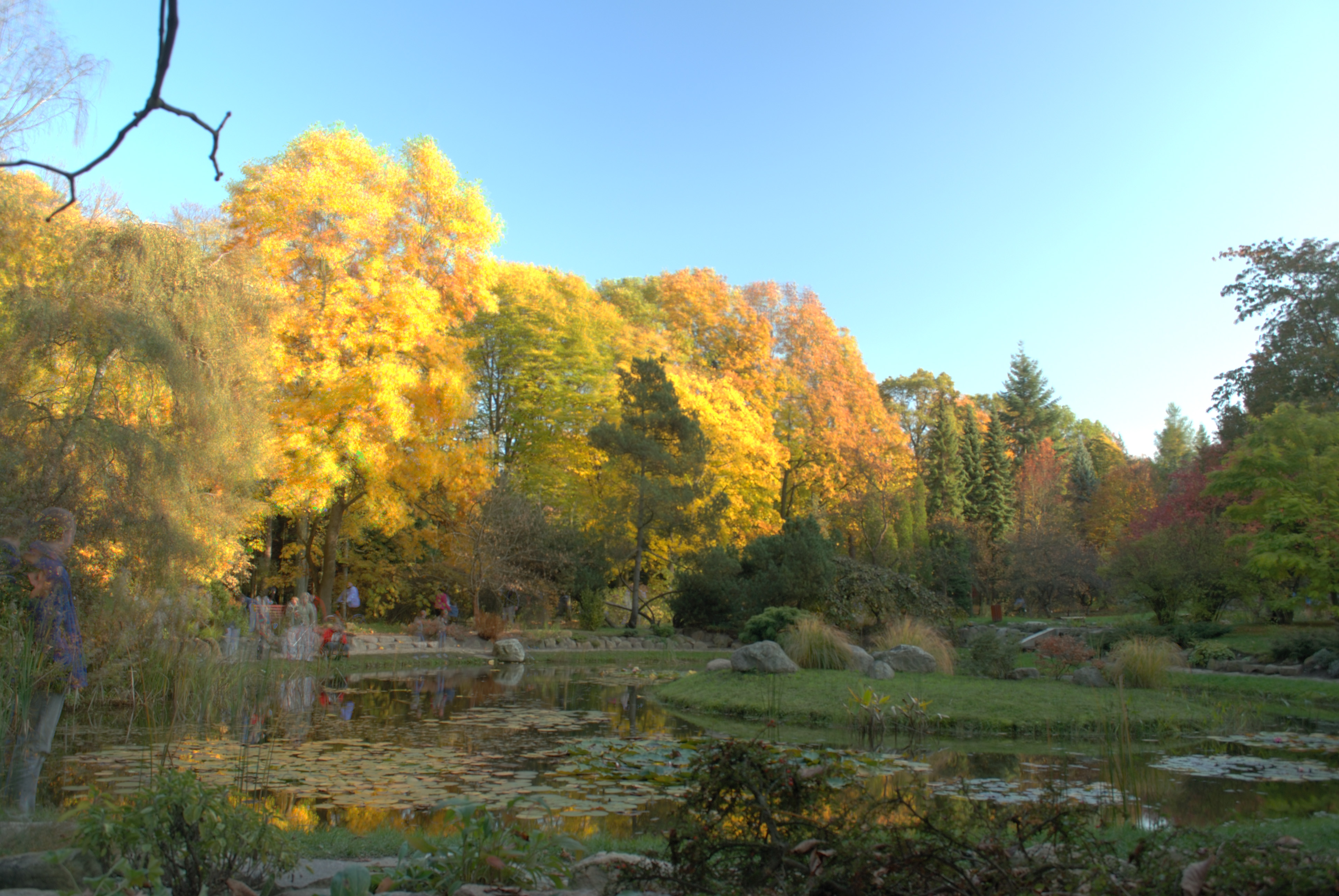 Arboretum w Rogowie - widok na staw w alpinarium.